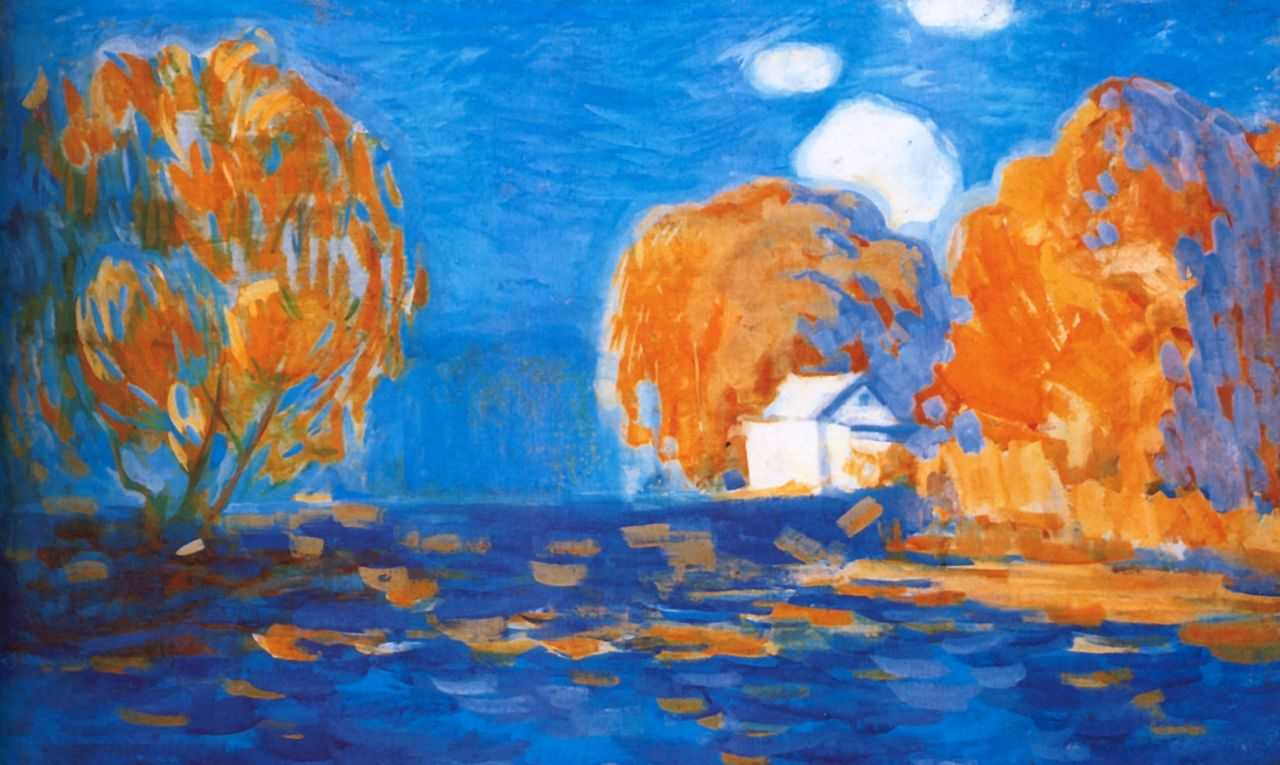 Золотая осень, Пётр Саввич Уткин